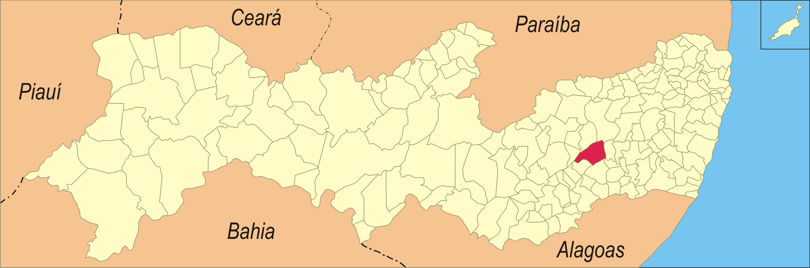 Localização da cidade no estado de Pernambuco